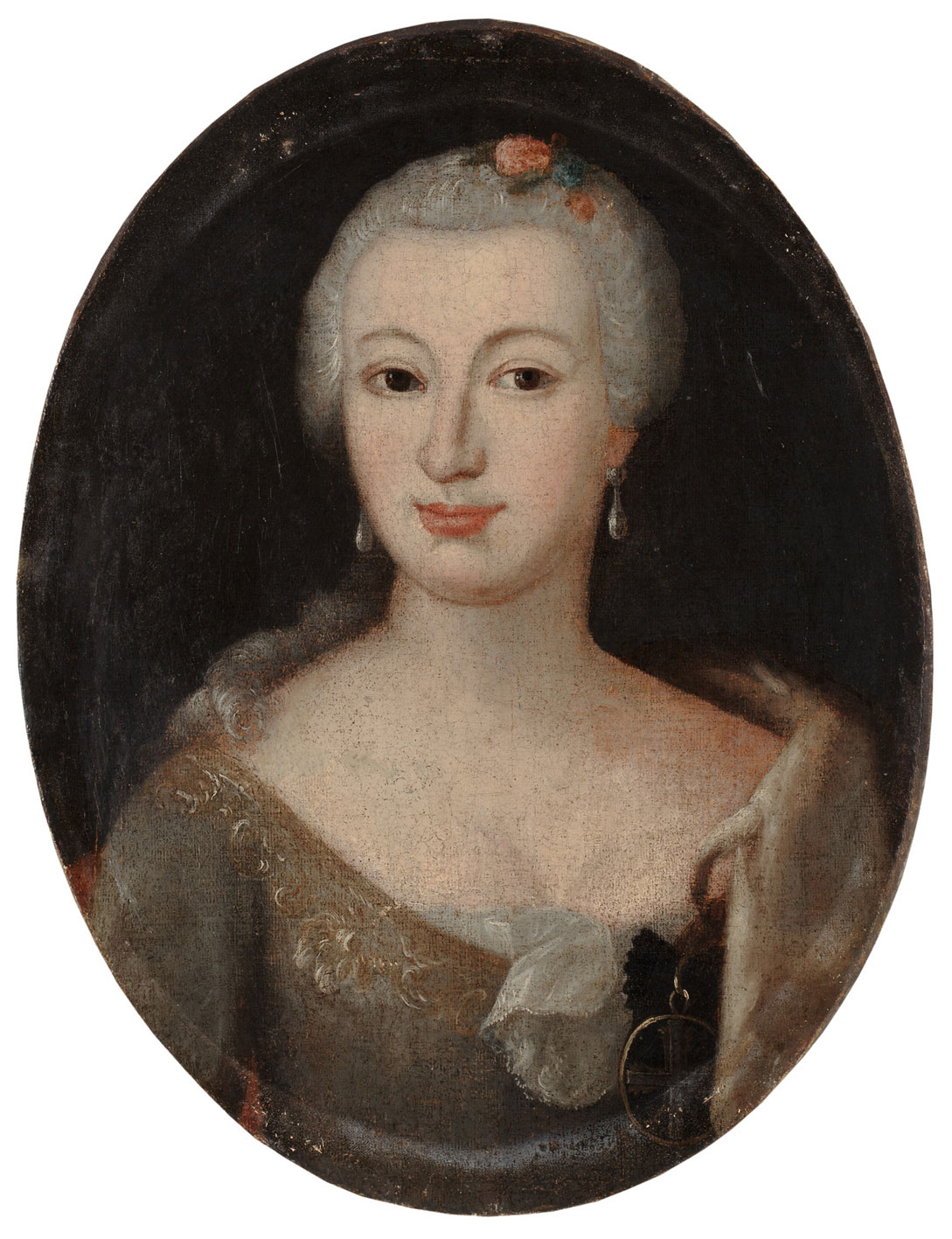 Portrait of Aleksandra Oginska (1730-1798)label QS:Len,"Portrait of Aleksandra Oginska (1730-1798)"label QS:Lpl,"Portret Aleksandry Ogińskiej (1730-1798)"